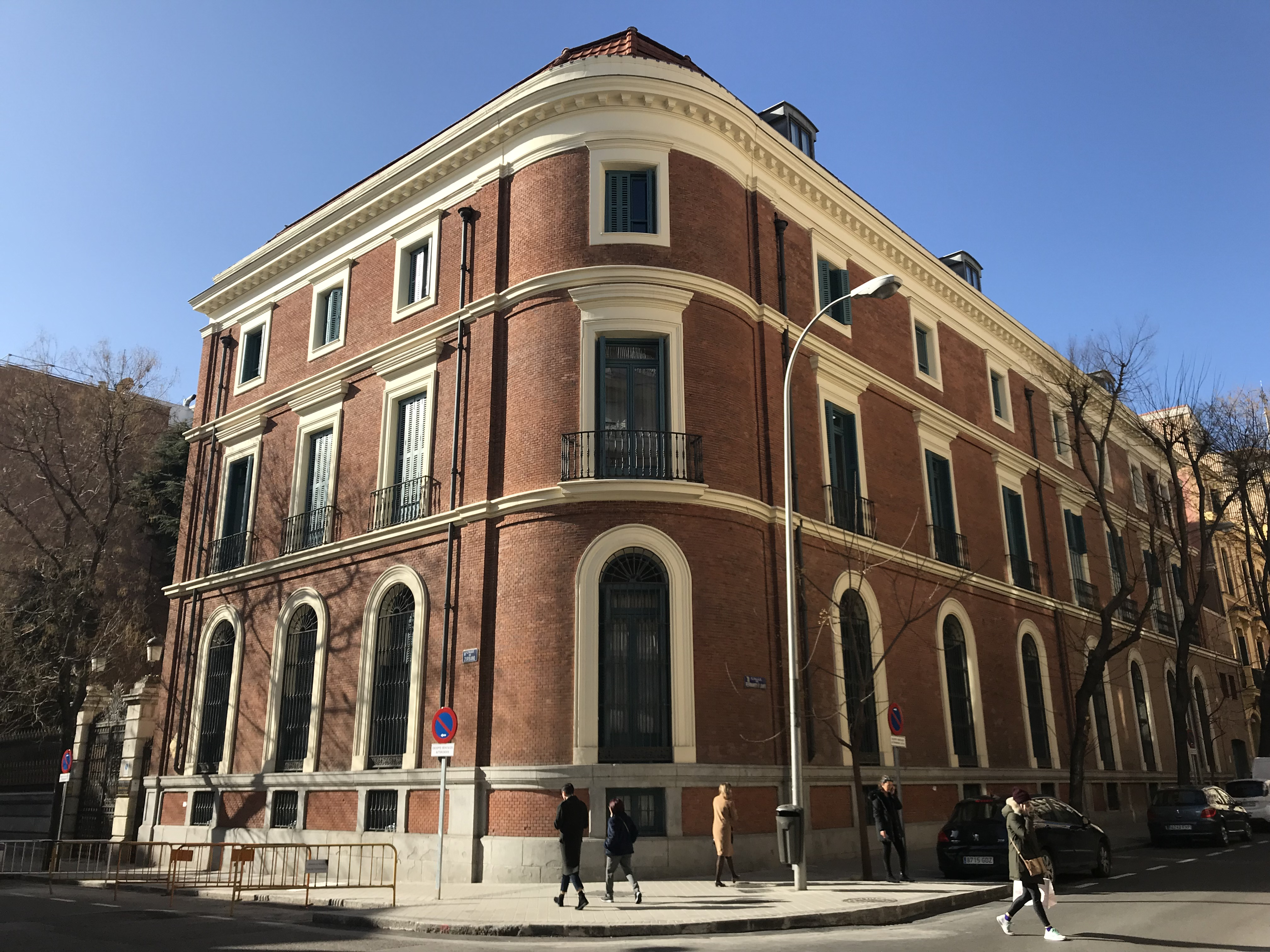 Palacio de Zurbano